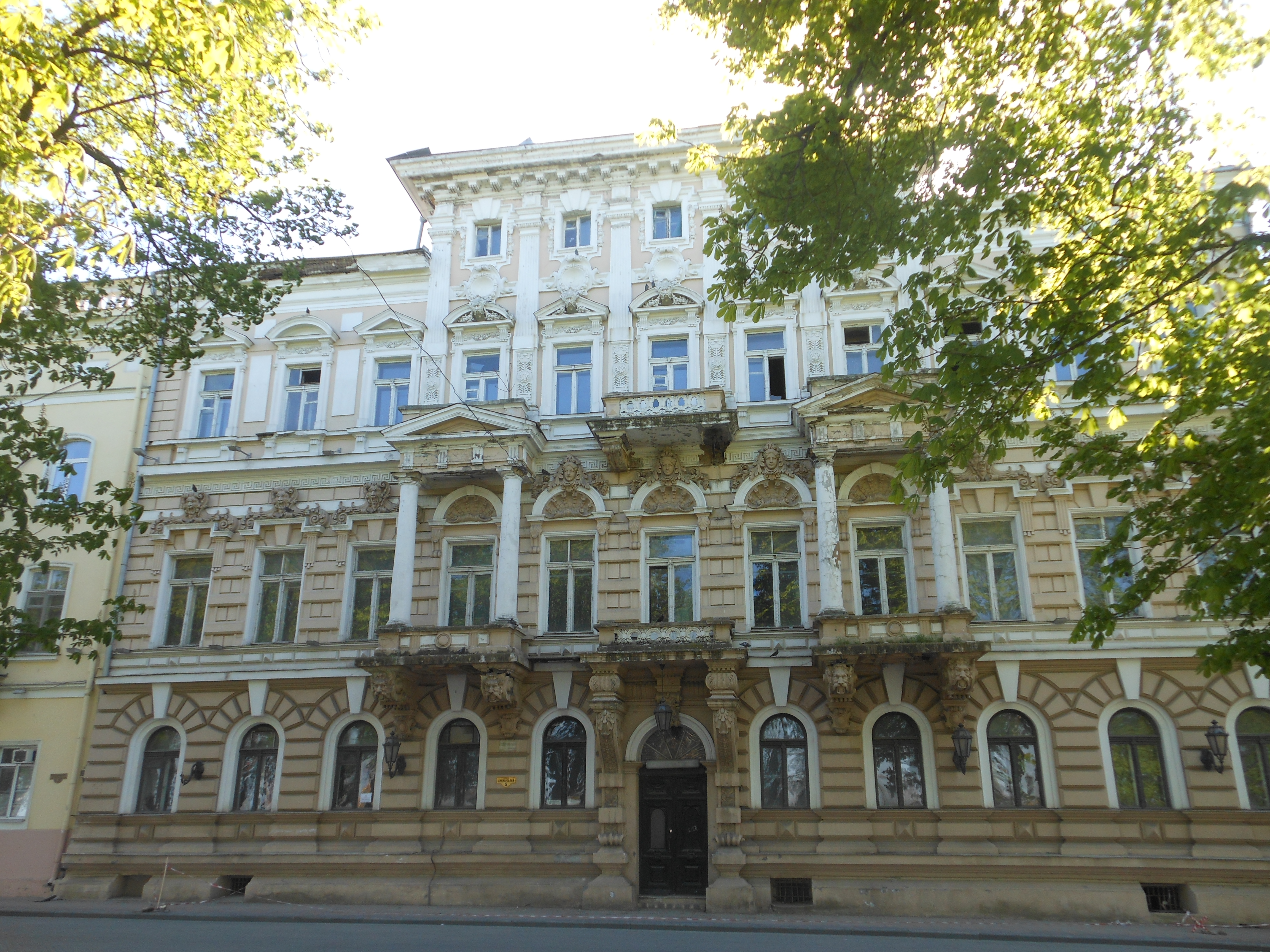 Будинок прибутковий Лерхе, Одеса, Приморський бул., 5